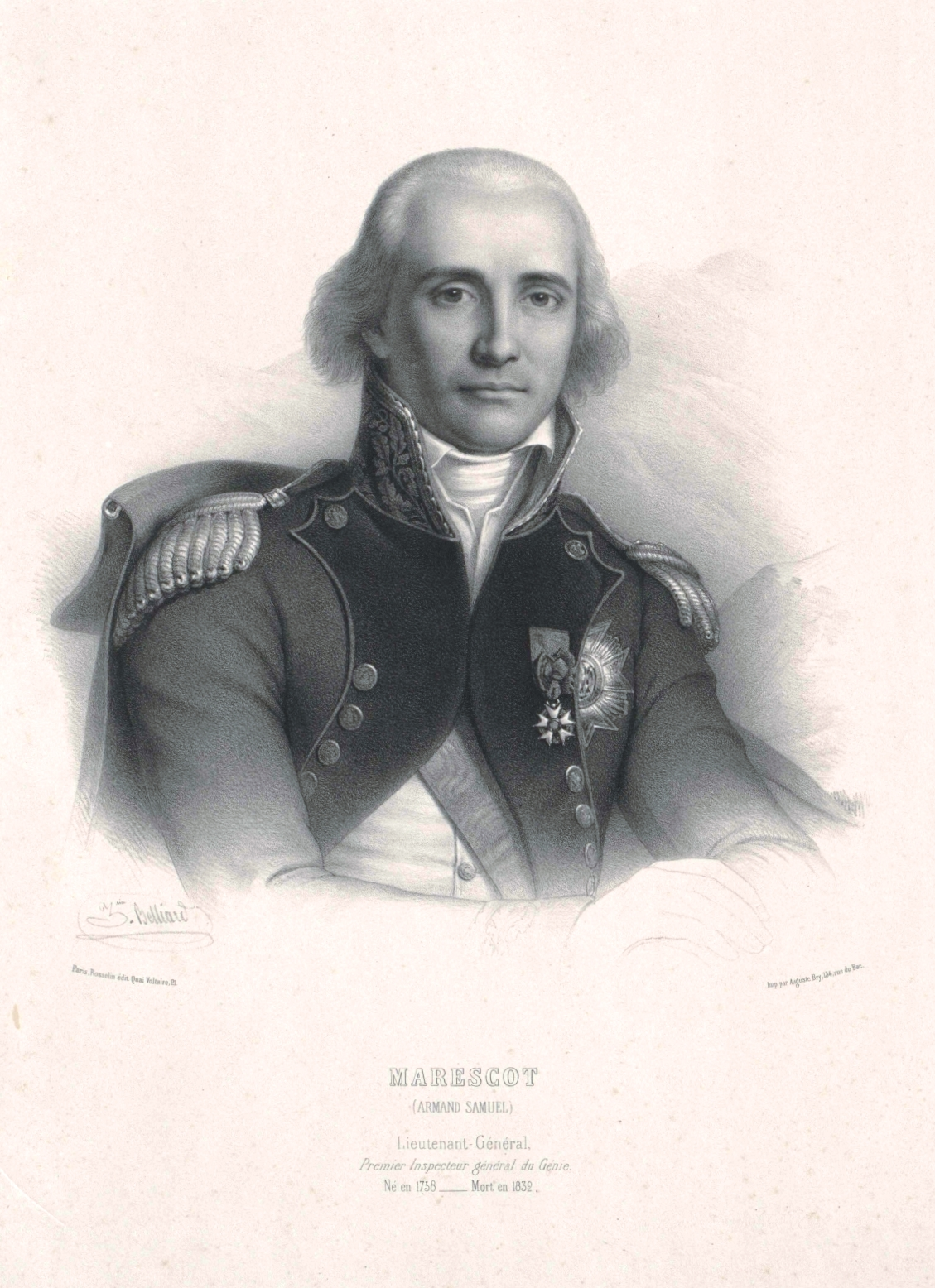 Armand Samuel de Marescot (1758-1832), French general